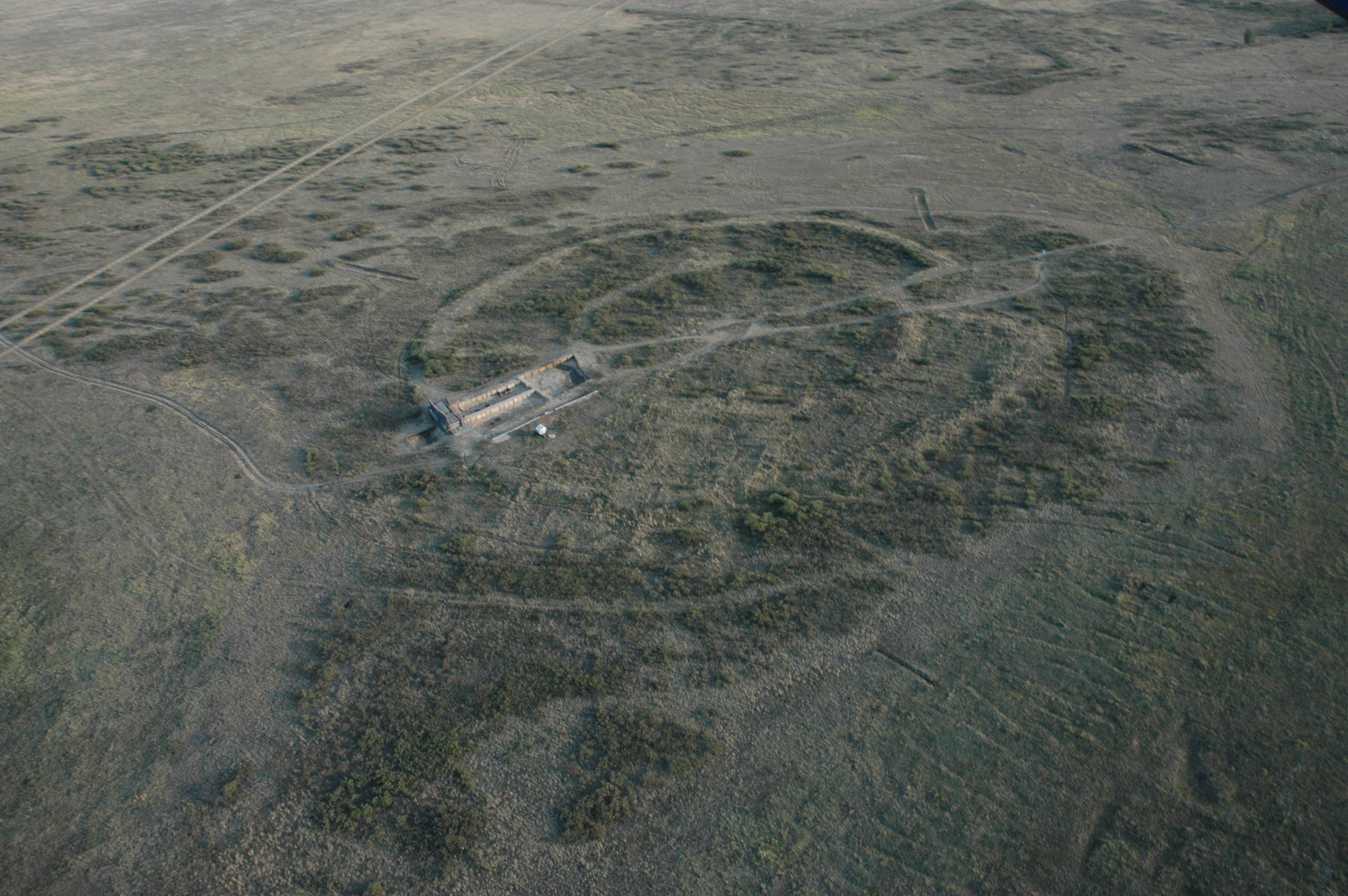 Городище "Аркаим": 10 км северо-западнее поселка, левый берег р.Большая Караганка, Амур, Брединский район, Челябинская область